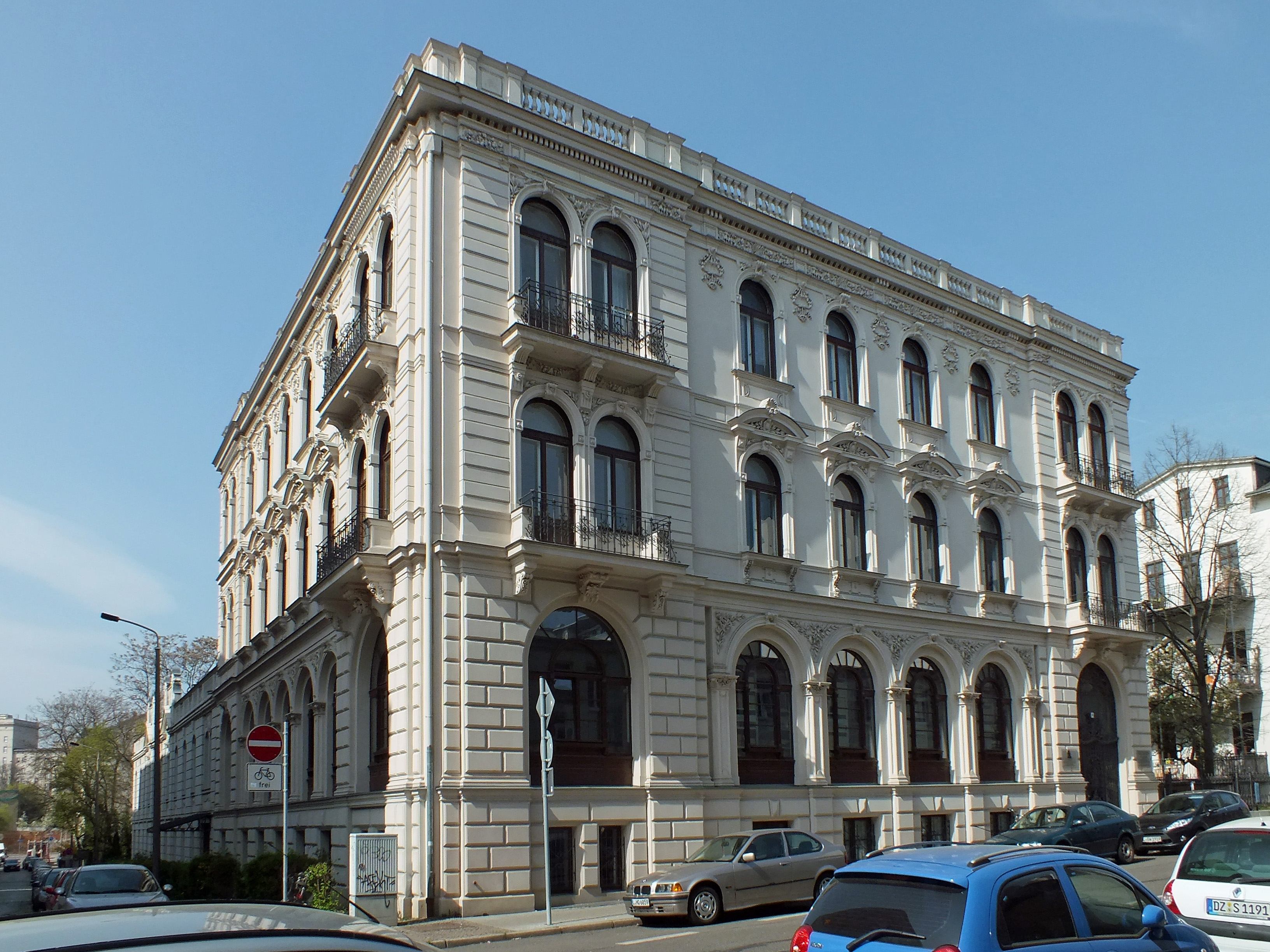 Die Grieg-Begegnungsstätte (ehemals Edition Peters) in der Talstraße in Leipzig